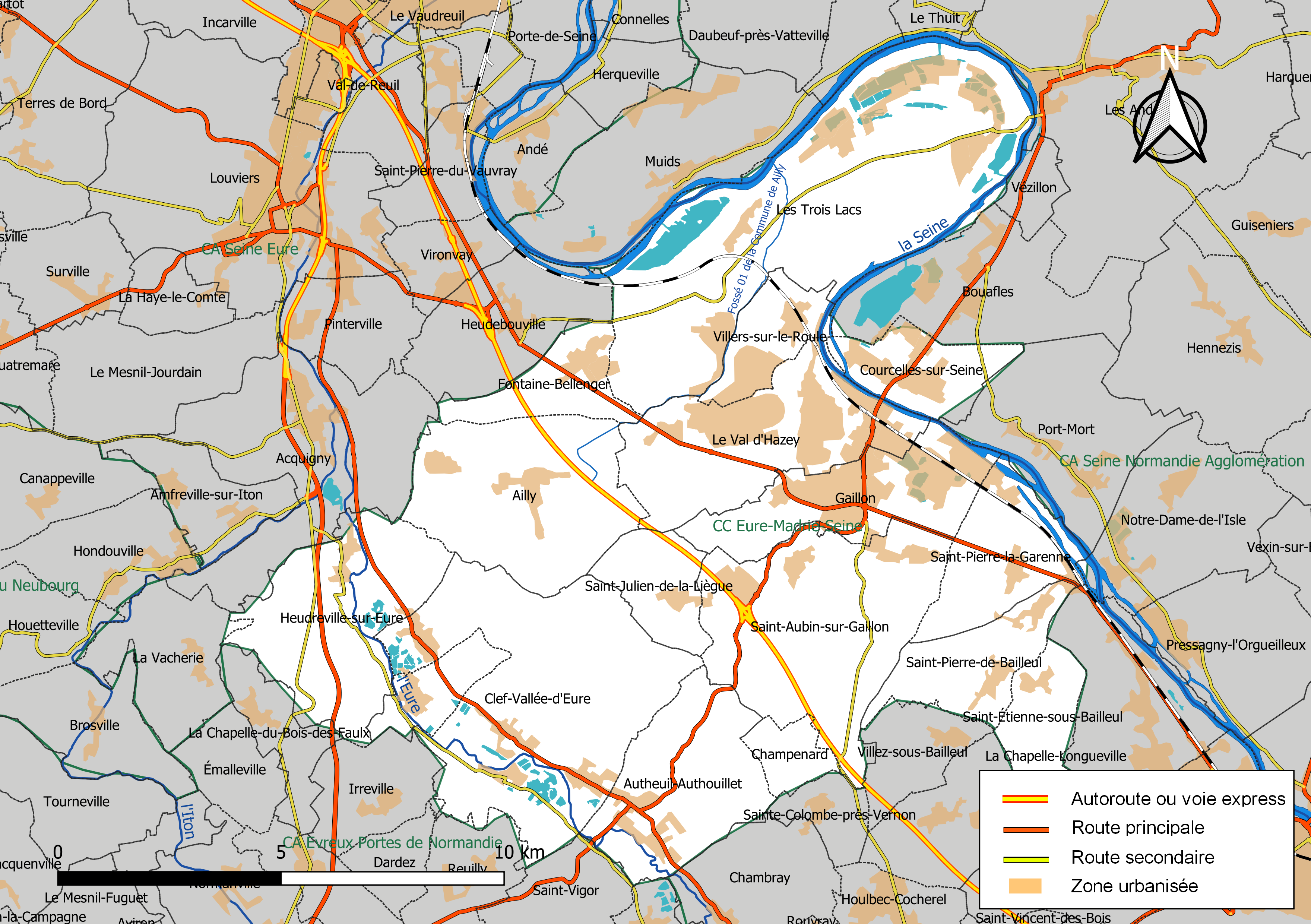 Carte géographique de la Communauté de communes Eure-Madrie-Seine, département de l'Eure, France. Composition au 1er janvier 2019.